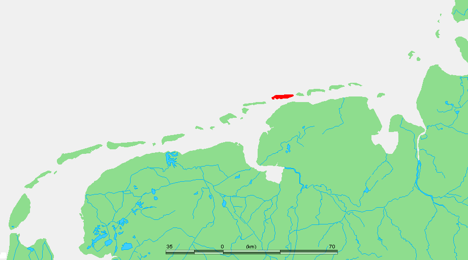 Wadden - Norderney